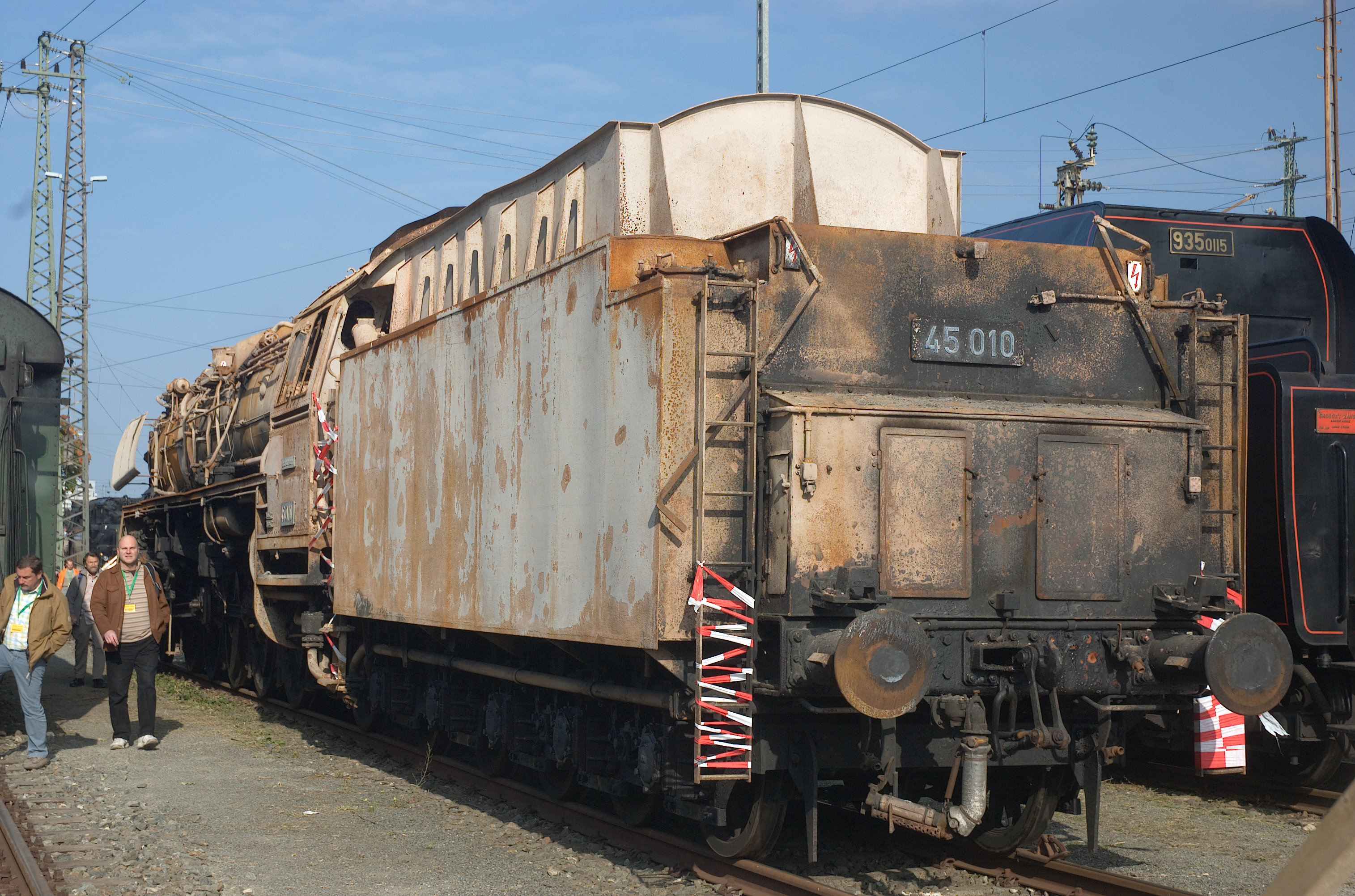 Dampflokomotive der Baureihe 45 der Deutschen Bundesbahn im Bahnhof.